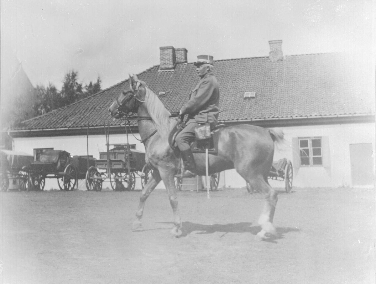 Oscar Strugstad, norsk offiser og politiker.